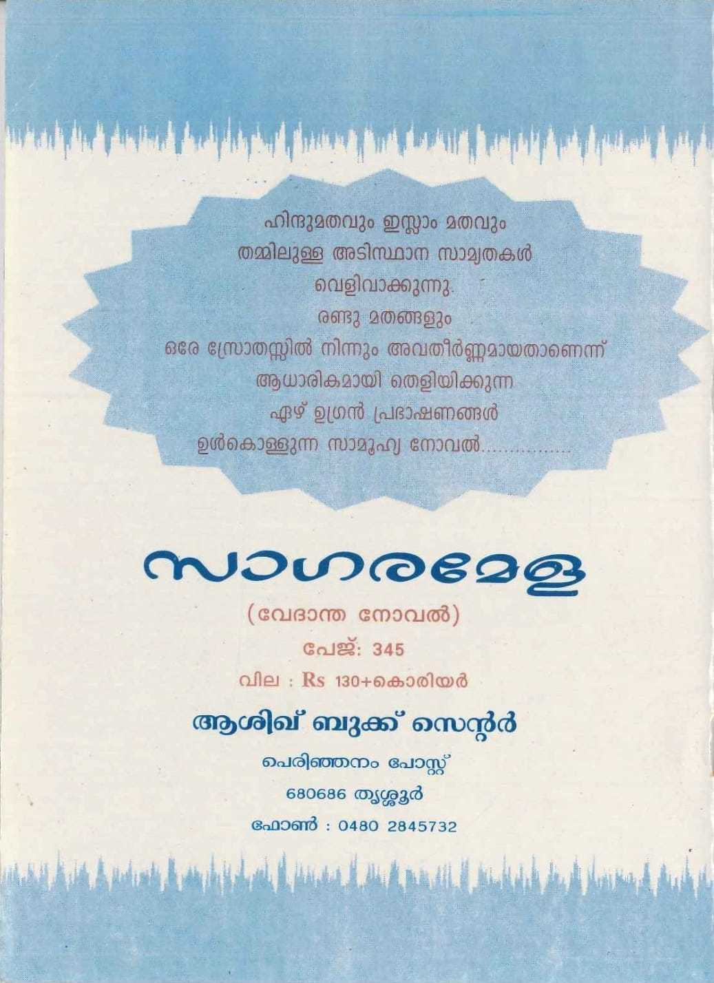 വി.വി.അബ്ദുല്ല സാഹിബ് എഴുതിയ പുസ്തകത്തിന്റെ കവർ